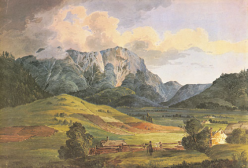 Ansicht des Schneeberges von Pfennigbach bei Puchberg aus auf die Flanke des Massivs mit der breiten Ries in der Mitte. Rechts hinten im Taleinschnitt erscheint die Kuppe des Kuhschneeberges.[1]